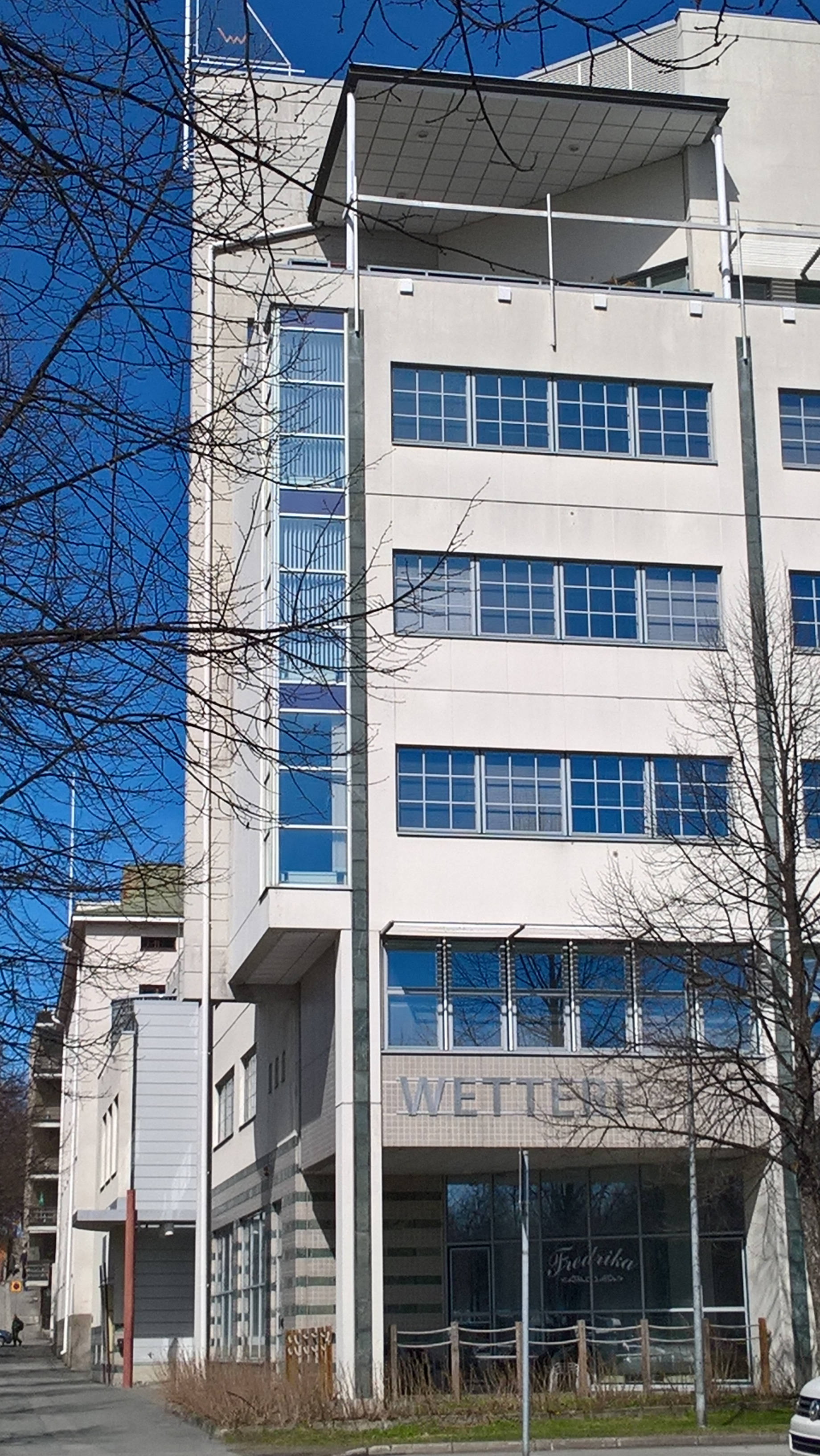 Wetteri